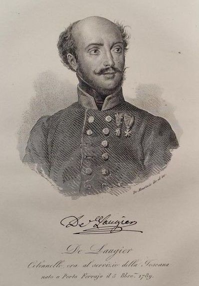 Italian general Cesare de Laugier de Bellecour (1789-1871)